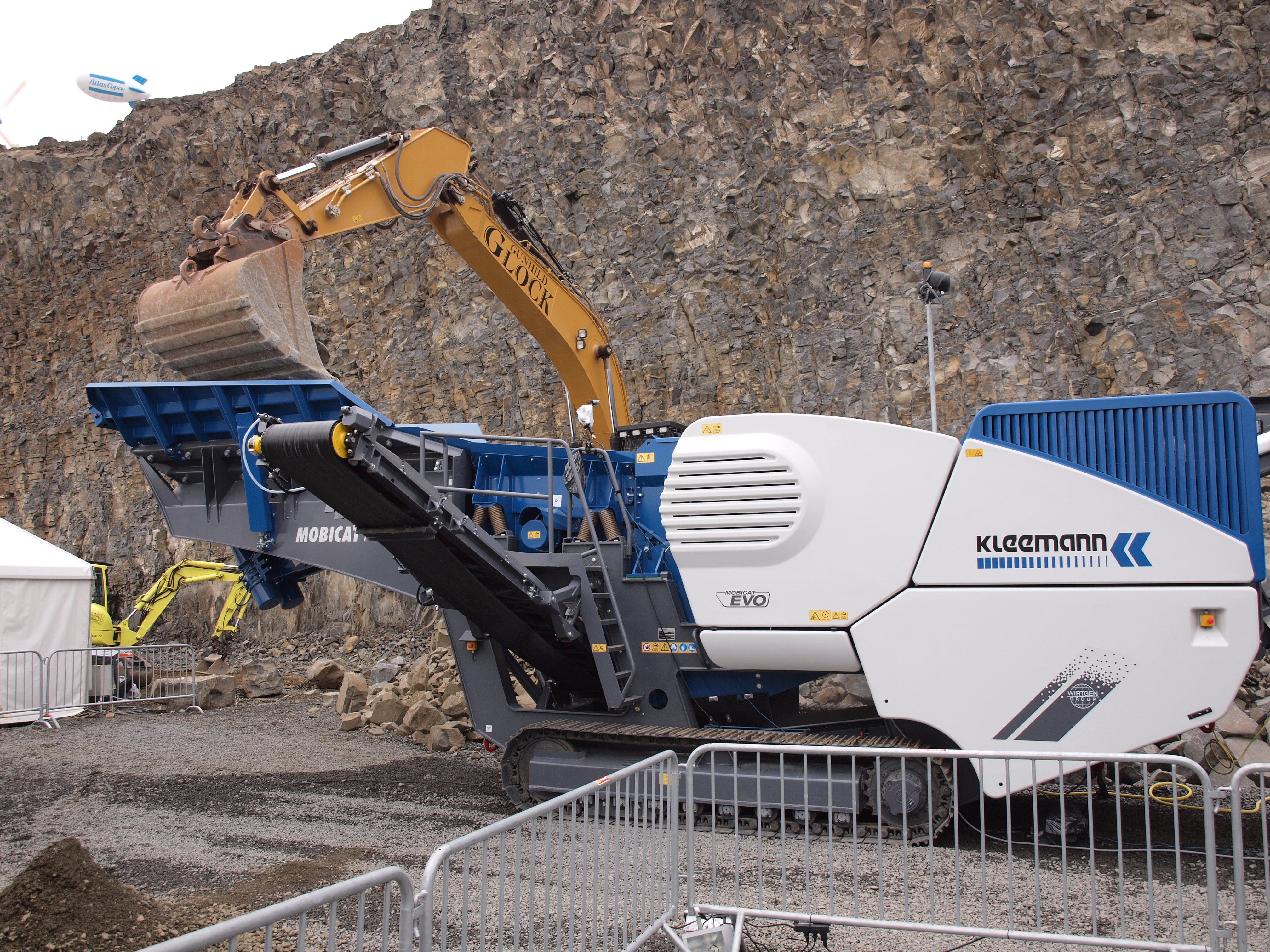 Mobile Backenbrecheranlage von Kleemann auf der Steinexpo 2014.